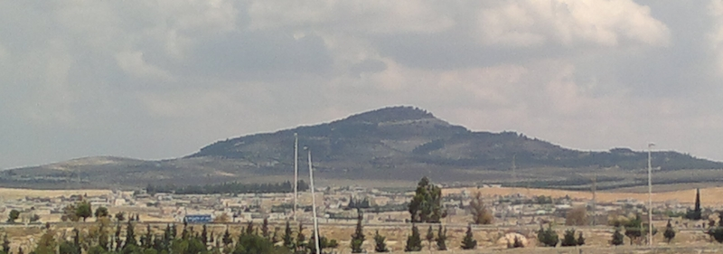 جبل كفراع شمال مدينة جماة